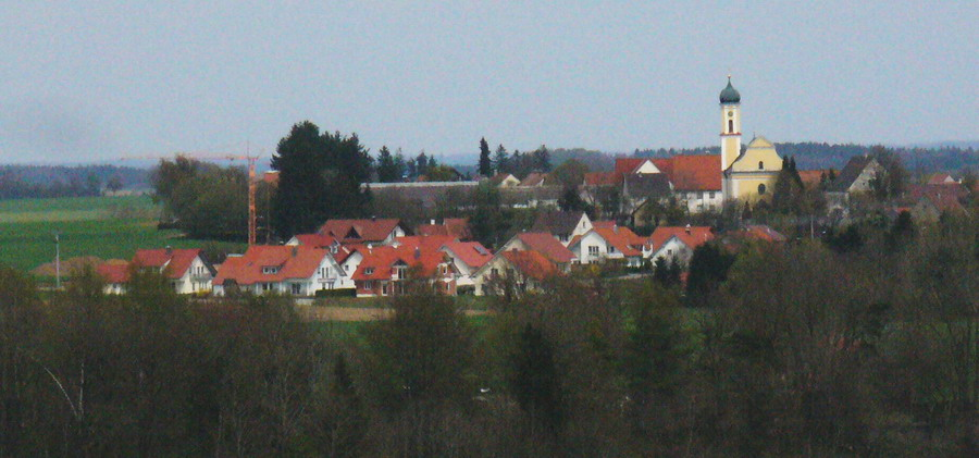 Bellamont im Kreis Biberach, Gemeinde Steinhausen an der Rottum